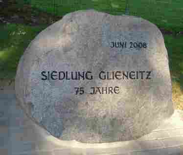 Dorfstein Glieneitz